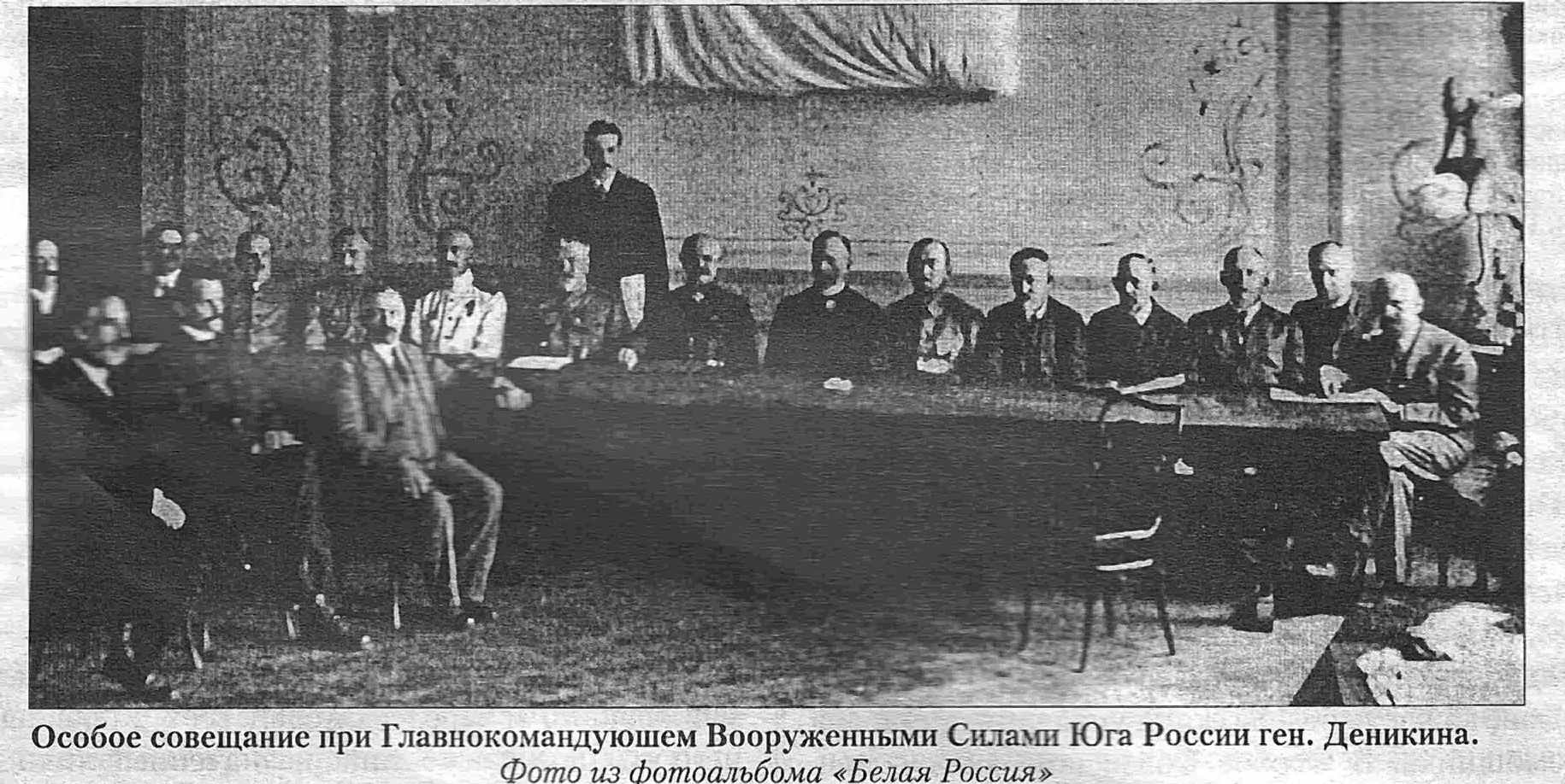 Заседание Особого совещания, 1919 год